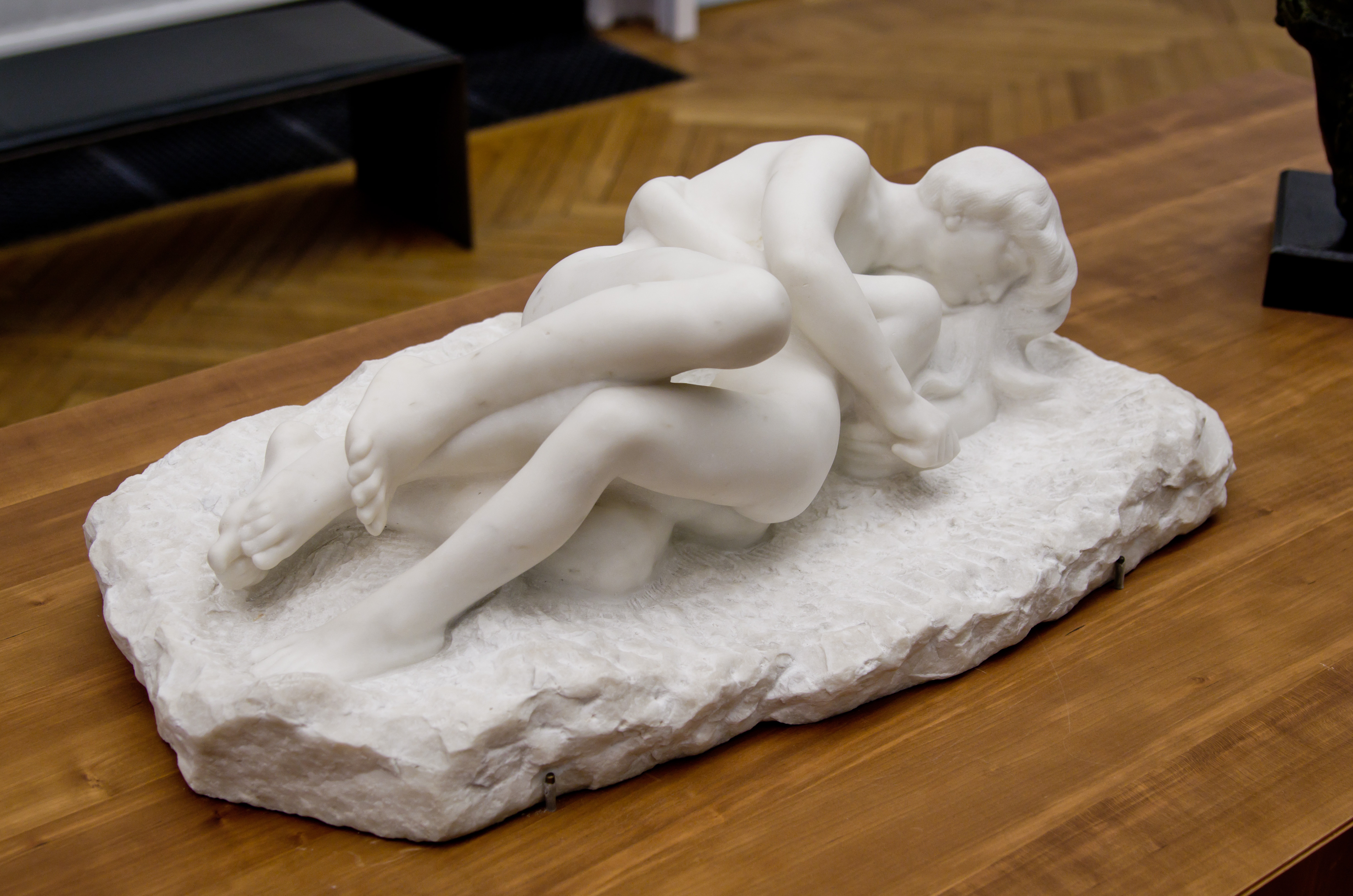 Amour et Psyché par Auguste Rodin, marbre d’après modèle plâtre, vers 1885 (exposé au Petit Palais)